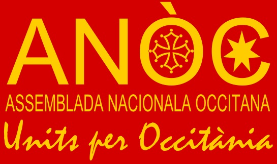 Logo officiel de l'ANÒC accompagné du slogan "Units per Occitània" (Unis pour l'Occitanie)